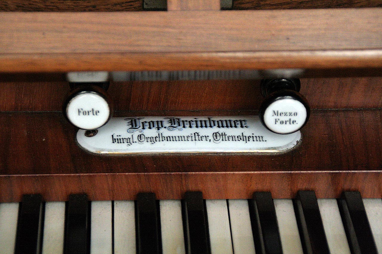 Namensschild des Orgelbauers Breinbauer am Spieltisch der Hauptorgel der Klosterkirche Vyšší Brod